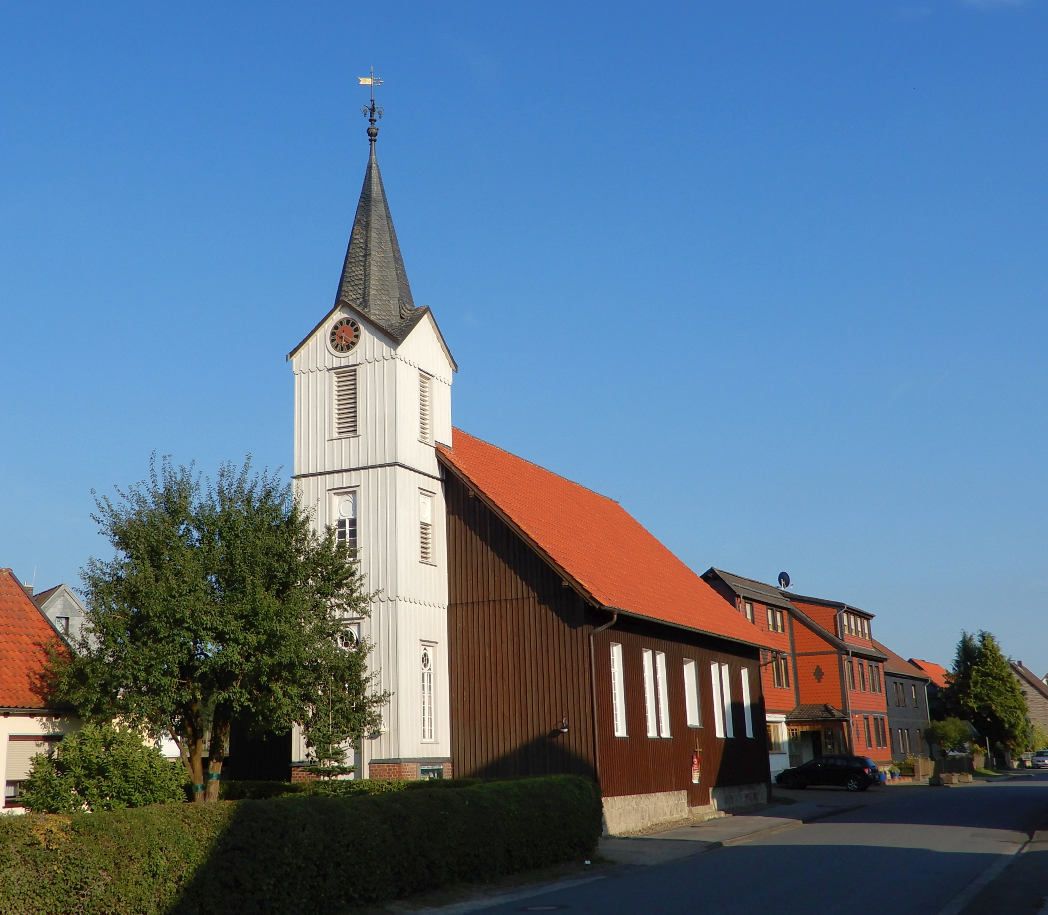 Kirche St. Simon und Judas in der Lasfelder Straße in Osterode-Lasfelde, ursprünglich als Kapelle errichtet und 1882 zur Kirche geweiht.